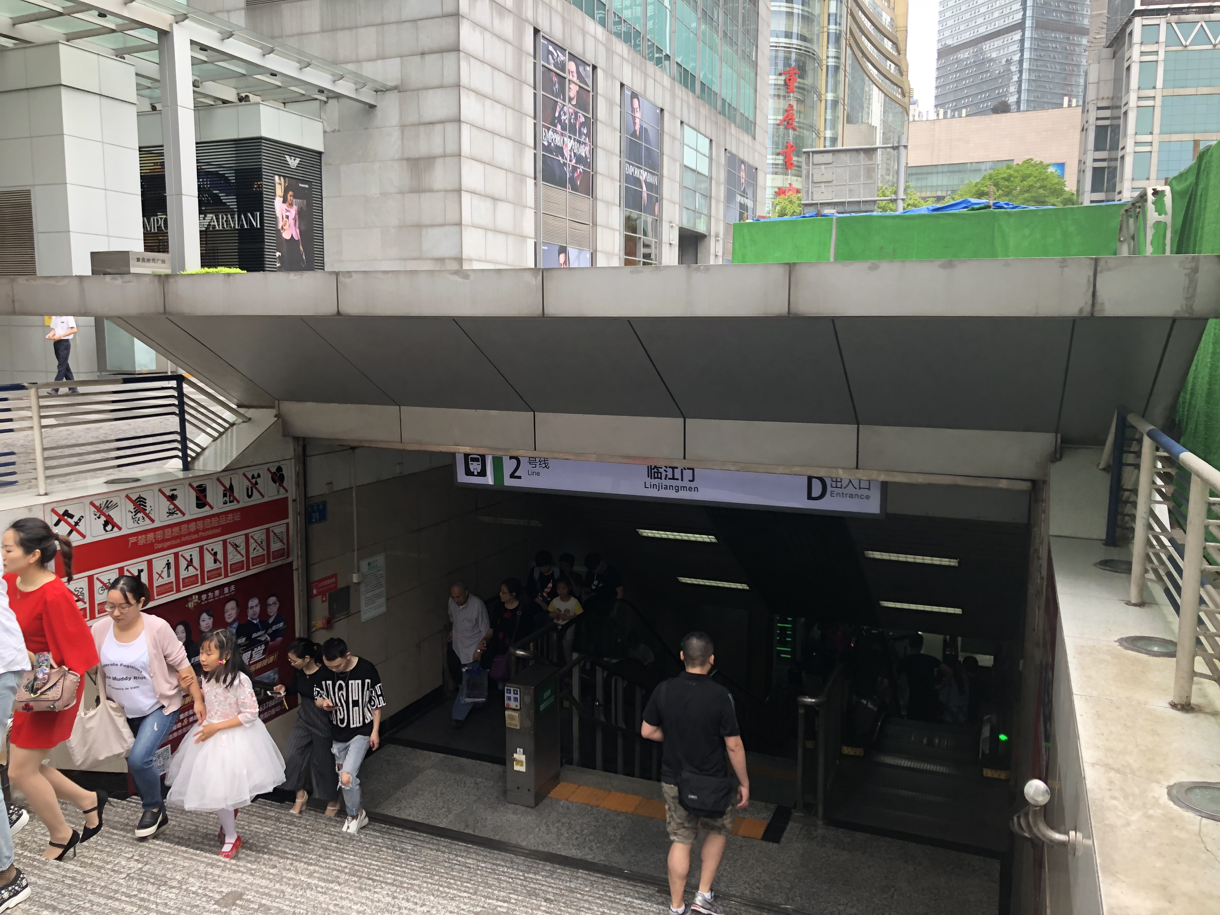 2号线临江门站D出口